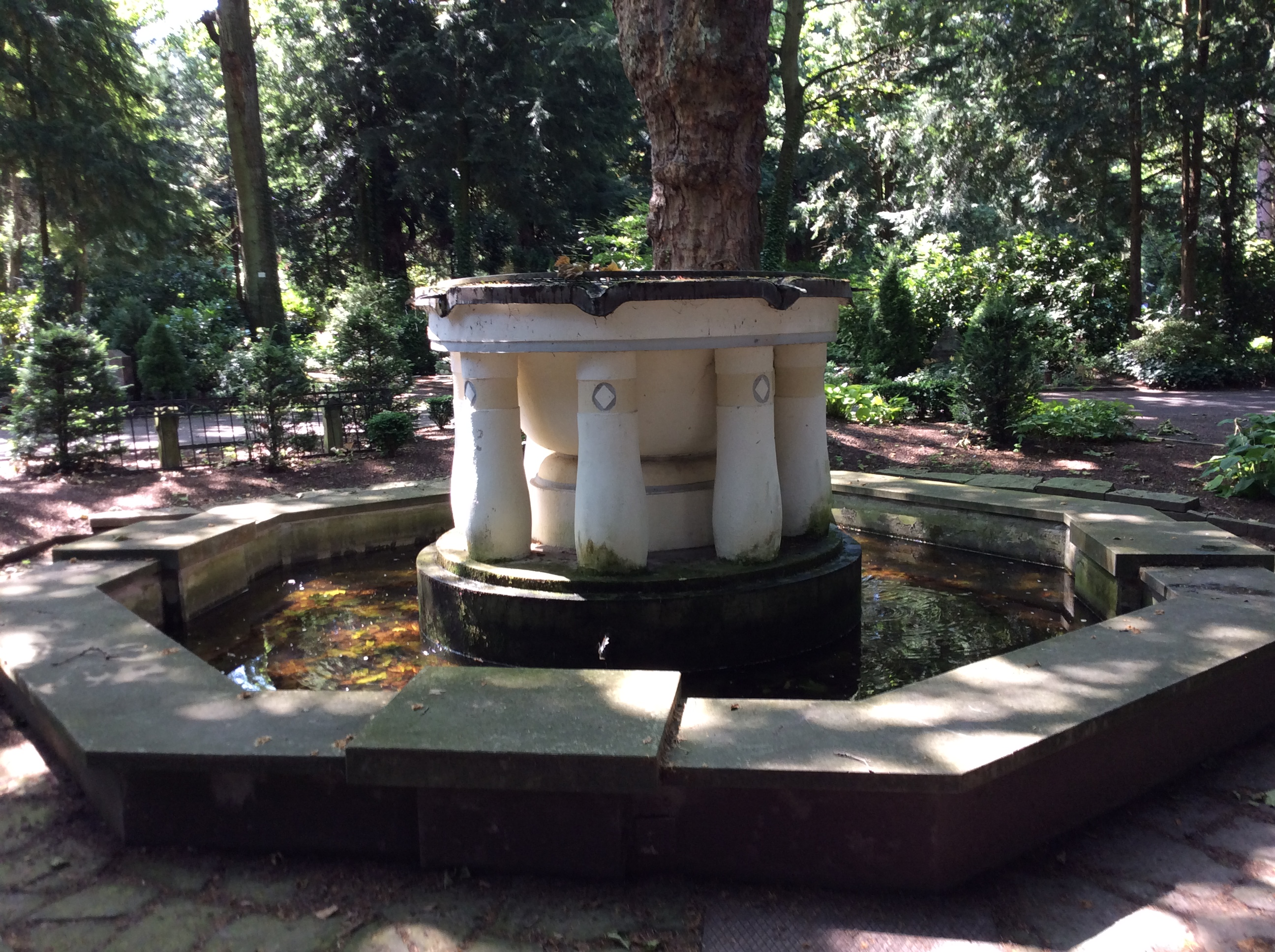 Der Brunnen im Eingangsbereich des Parkfriedhofs